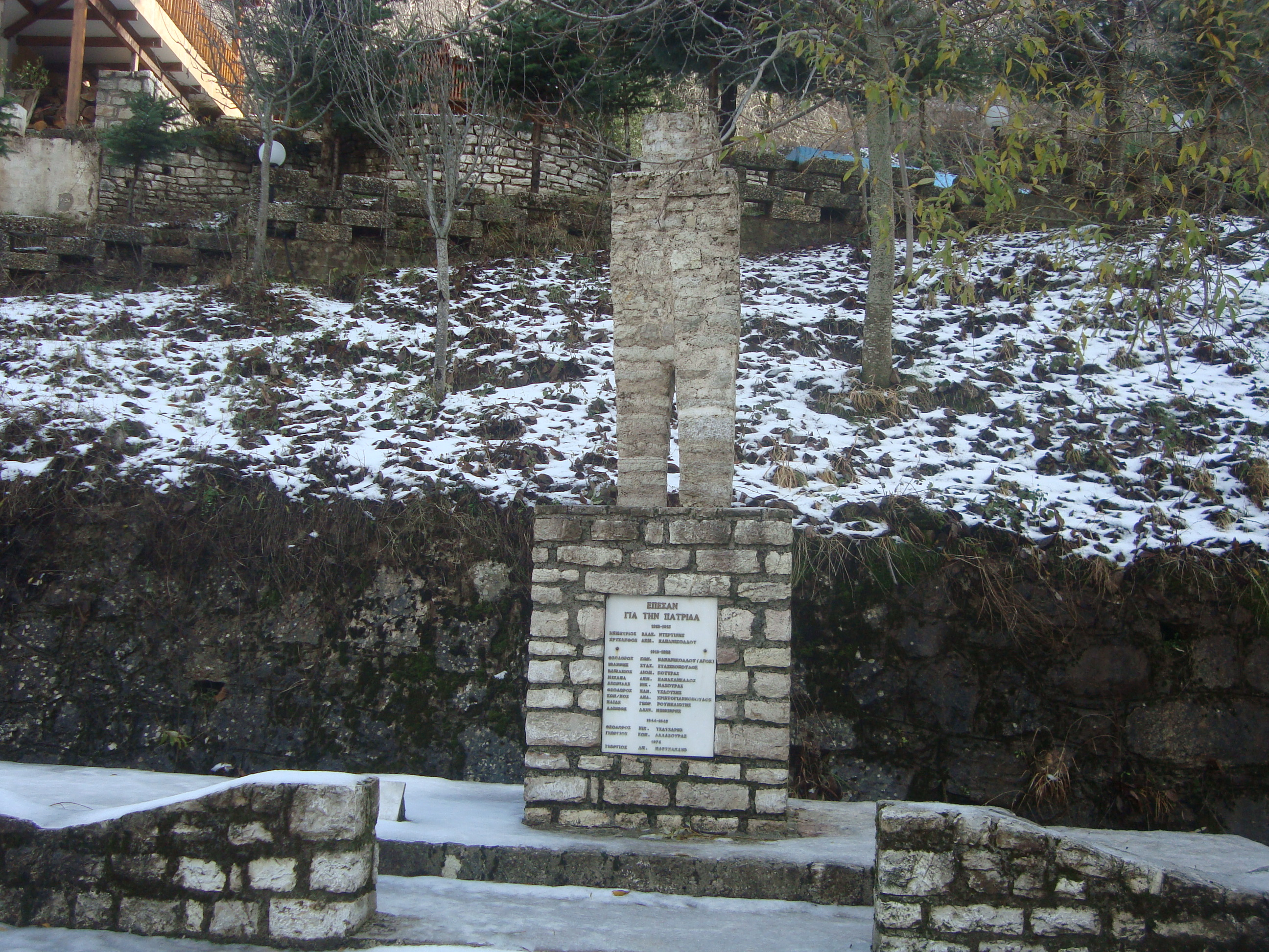 Το χωριό Κρυόβρυση Ηλείας